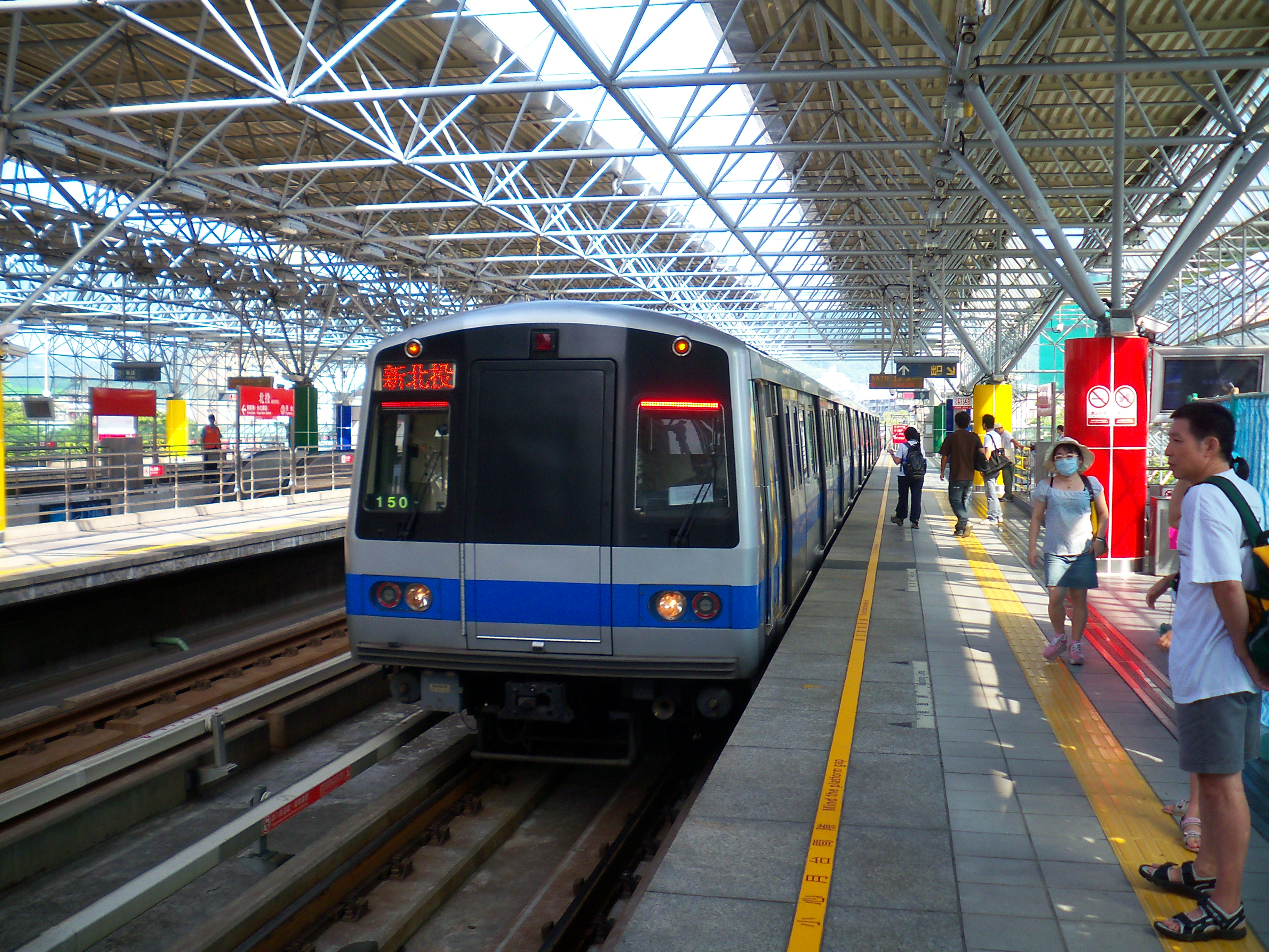 台北捷運淡水線北投駅4番線ホームの新北投駅行き列車。